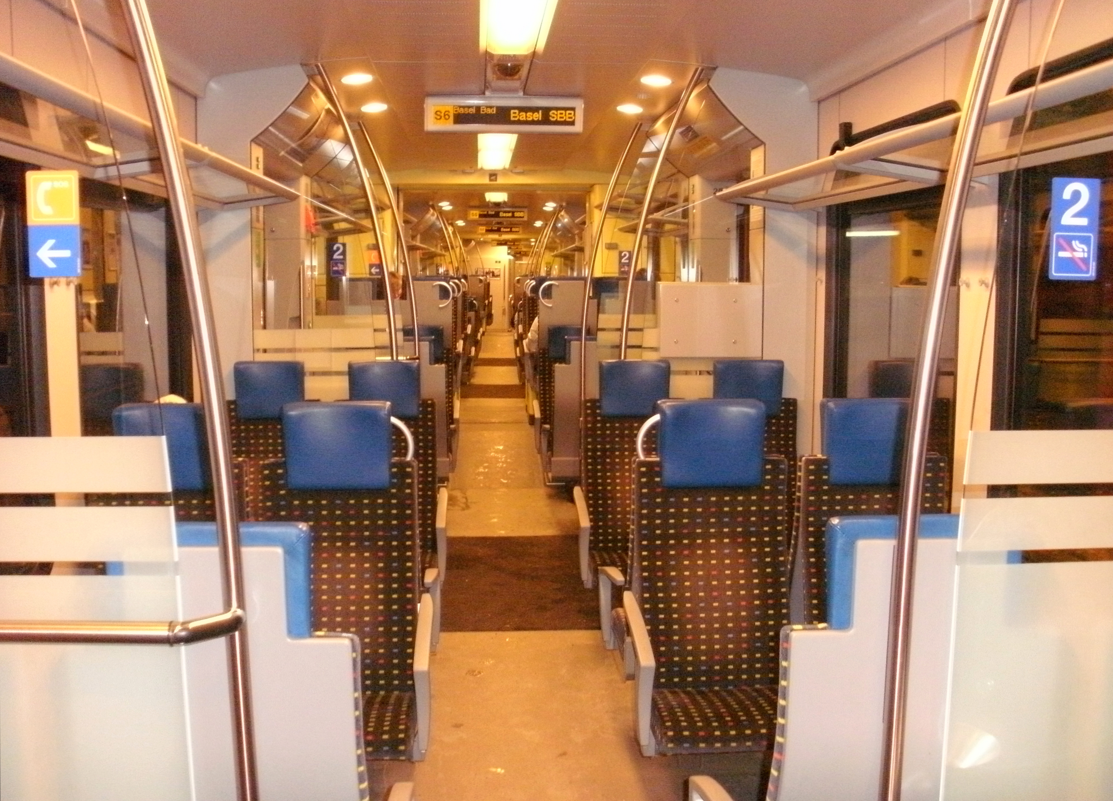 Triebzug Typ Stadler Flirt (SBB-Baureihe RABe 521), Innenaufnahme (Wiesentalbahn, Linie S6)